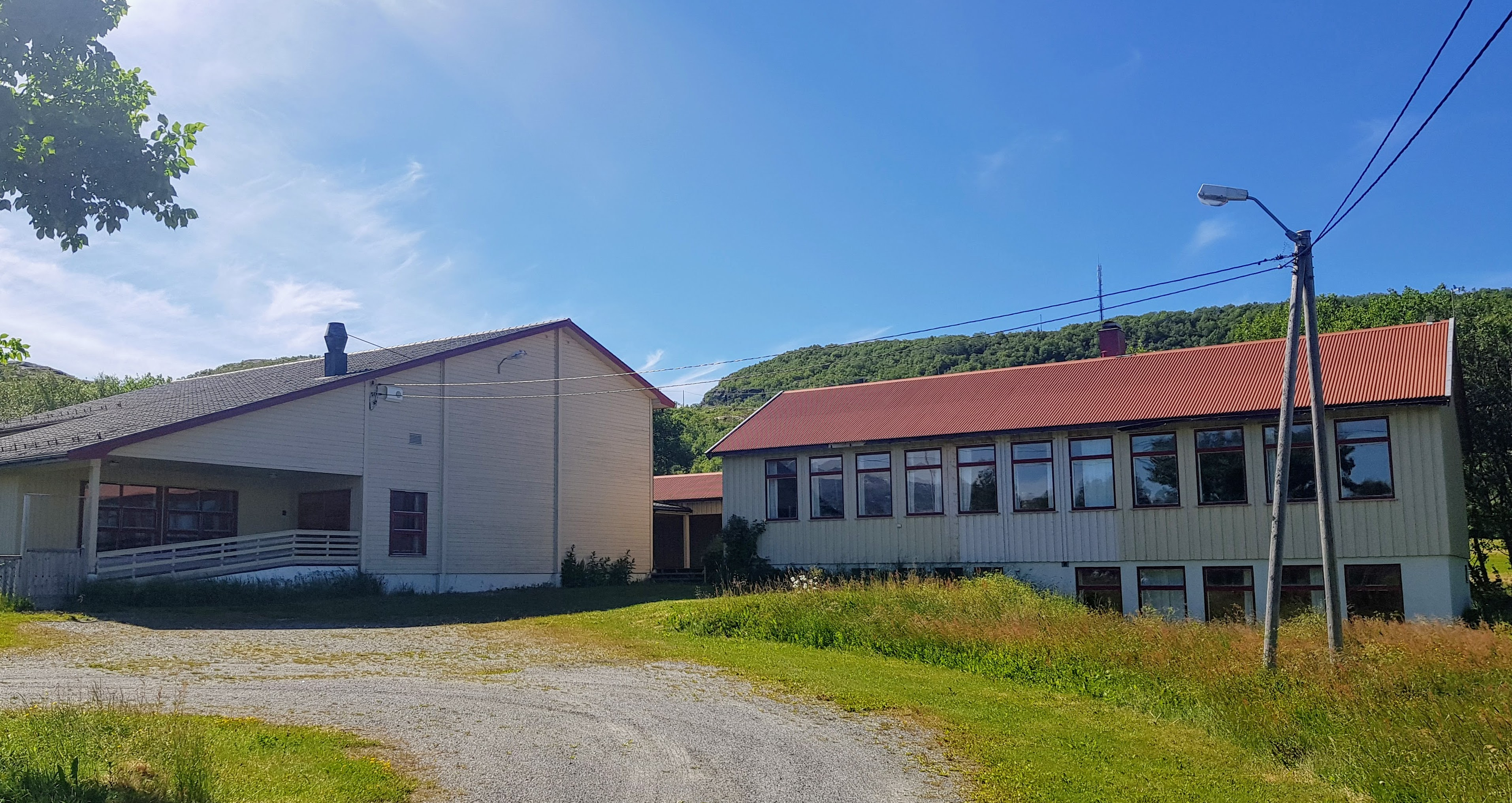 Skole (til høyre) og barnehage på Mindlandet. Begge er nedlagt.